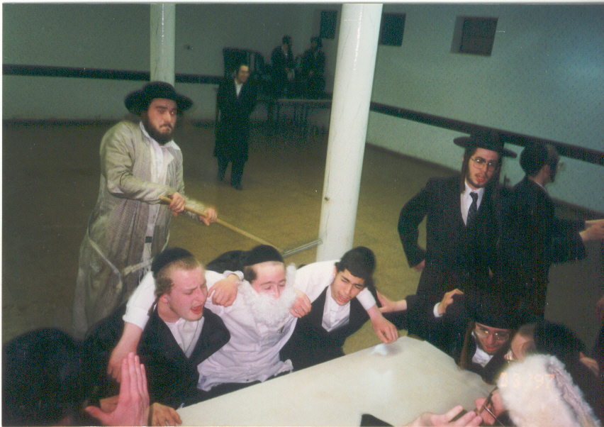 Yeshiva students celebrating in Yehiva Kohav Miyaakov, Jerusalem on Purim